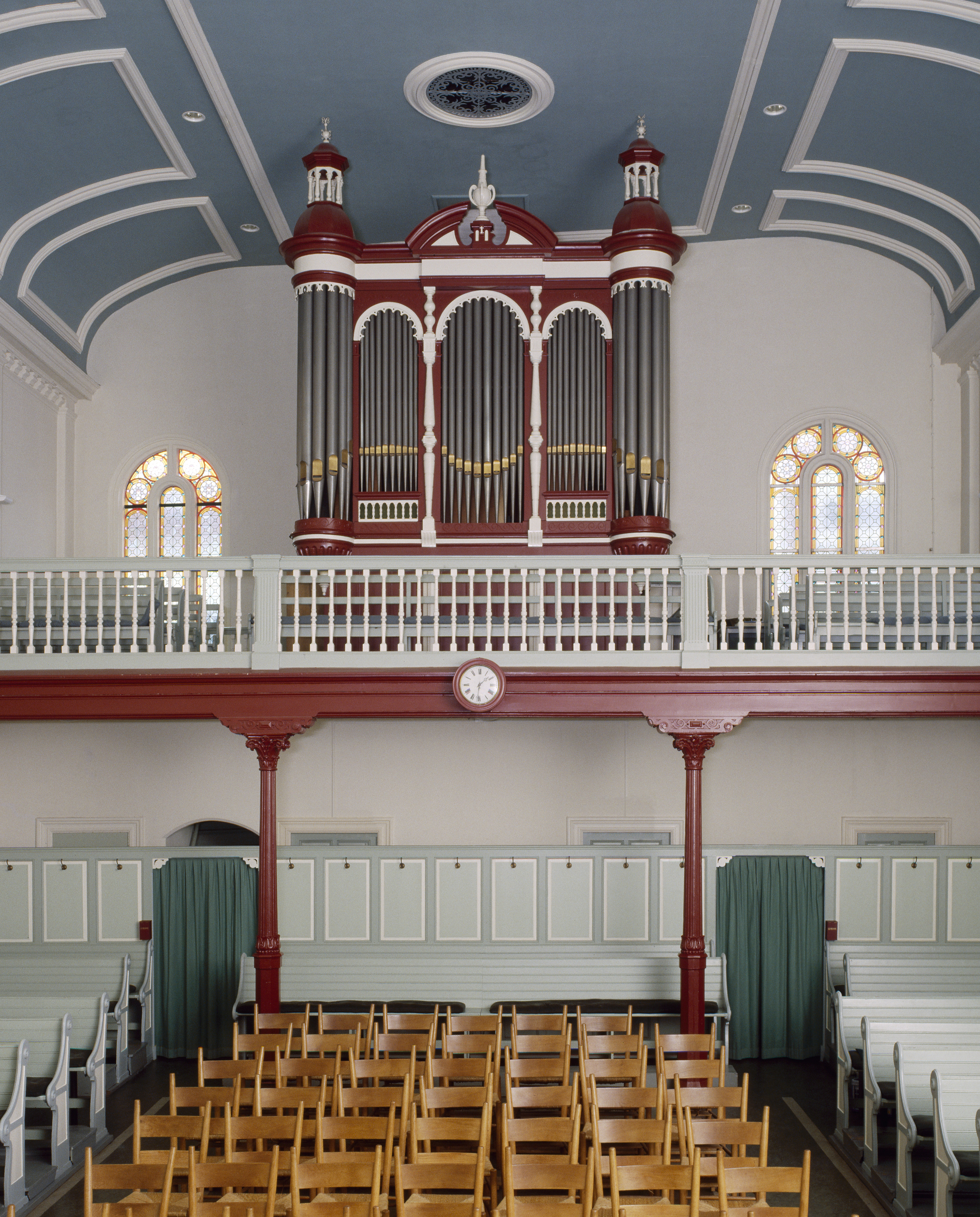 Doopsgezinde Kerk: Interieur, aanzicht orgel, orgelnummer 969 (opmerking: Gefotografeerd voor Het Historische Orgel in Nederland 1886-1894, bladzijde 169)